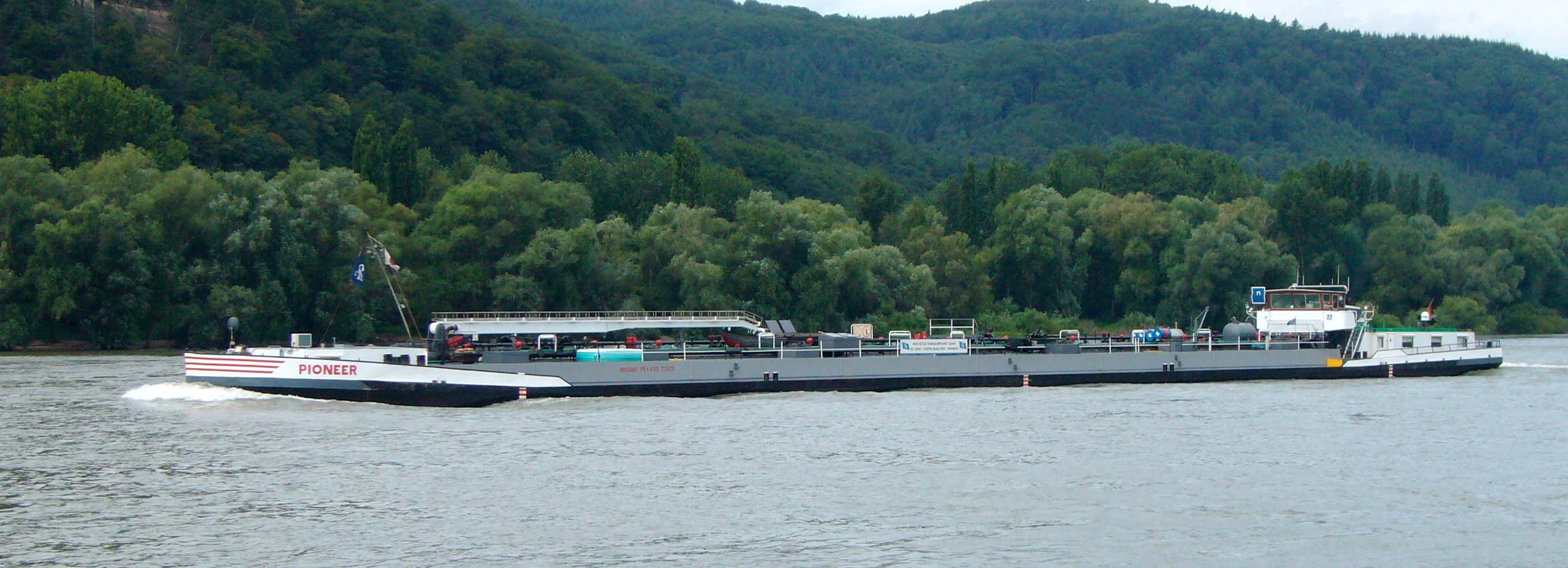 Bunkerschiff Pioneer (auf dem Mittelrhein)